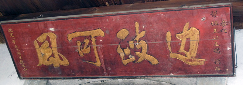 Bức hoành phi trong dinh thự họ Vương tại Hà Giang, Việt Nam